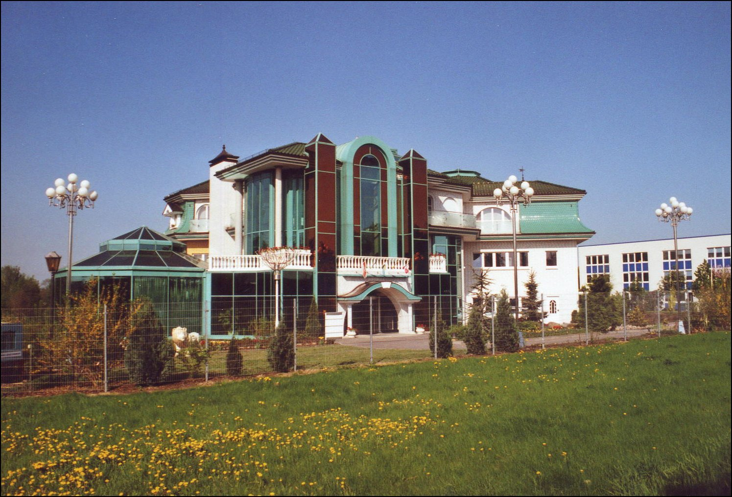 Wilsdruff: Zentrale der Firmengruppe Preiss-Daimler (PD-Group). Die PD-Group ist die größte konzernunabhängige Unternehmensgruppe in Sachsen. Dem Firmenverbund gehören 20 weltweit operierende Unternehmen an, die v.a. im Bereich der Produktion von Glaserzeugnissen, Glasseide und -fasern, Feuerfestmaterial und Stahlkonstruktionen tätig sind. Die Firmen erwirtschafteten 2003 einen Umsatz von 457 Mill. € und zählen mittlerweile ca. 6.500 Mitarbeiter.